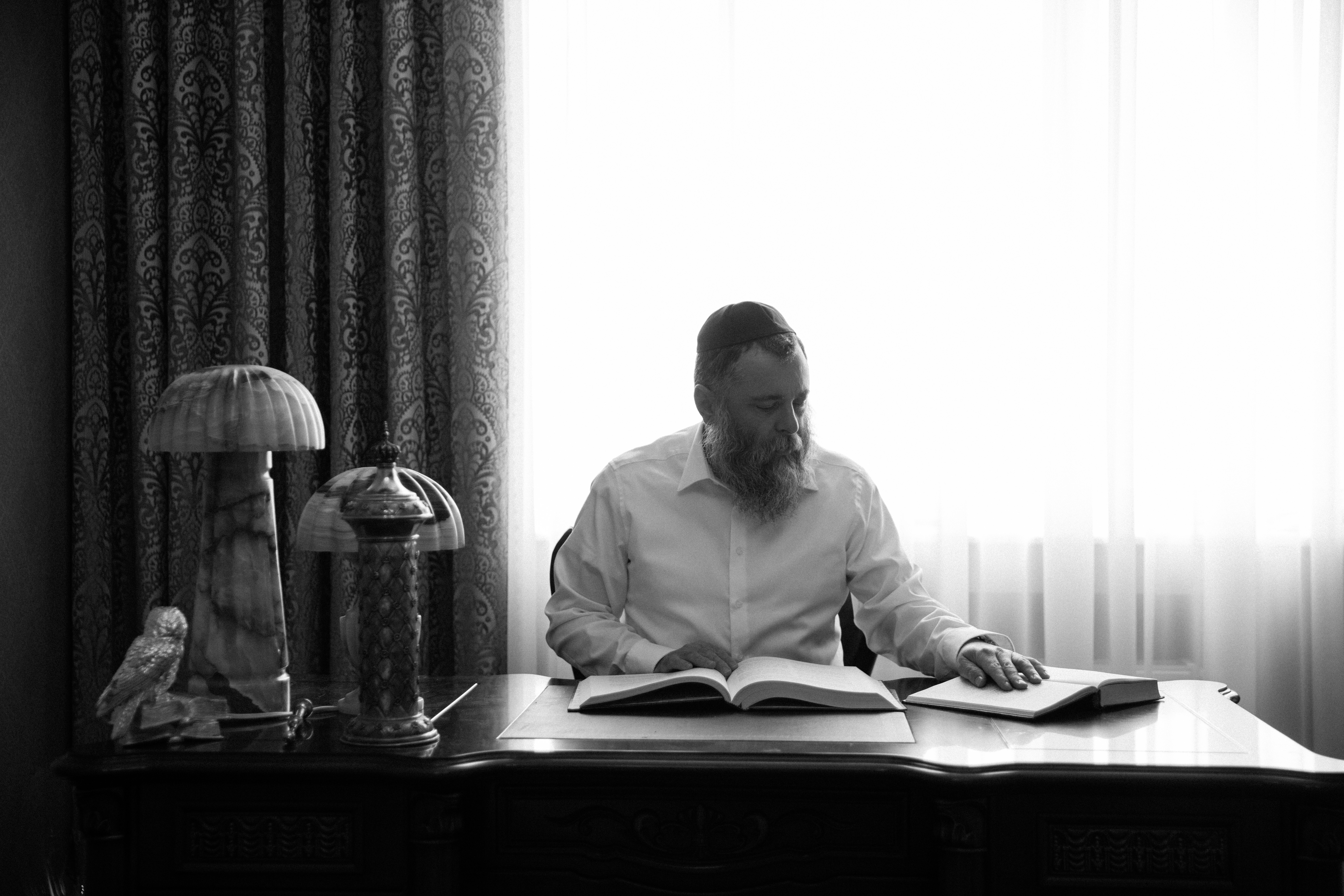 Маркович, Йонатан Биньямин